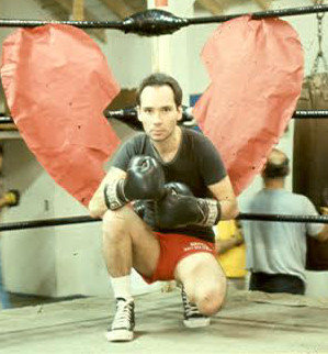 Jerry Dreva 1981